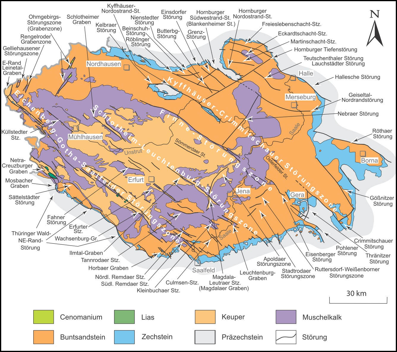 Saxonische Bruchstörungen im Bereich des Thüringer Beckens sensu lato (Auswahl) Darstellung ohne känozoische Bildungen (nach Geologie-Standard TGL 34331/01 1983; G. LANGE et al. 1990; G.KATZUNG & G. EHMKE/Hrsg. 1993; G. SEIDEL et al. 2002; I. RAPPSILBER 2003; G. SEIDEL 2003, 2004)